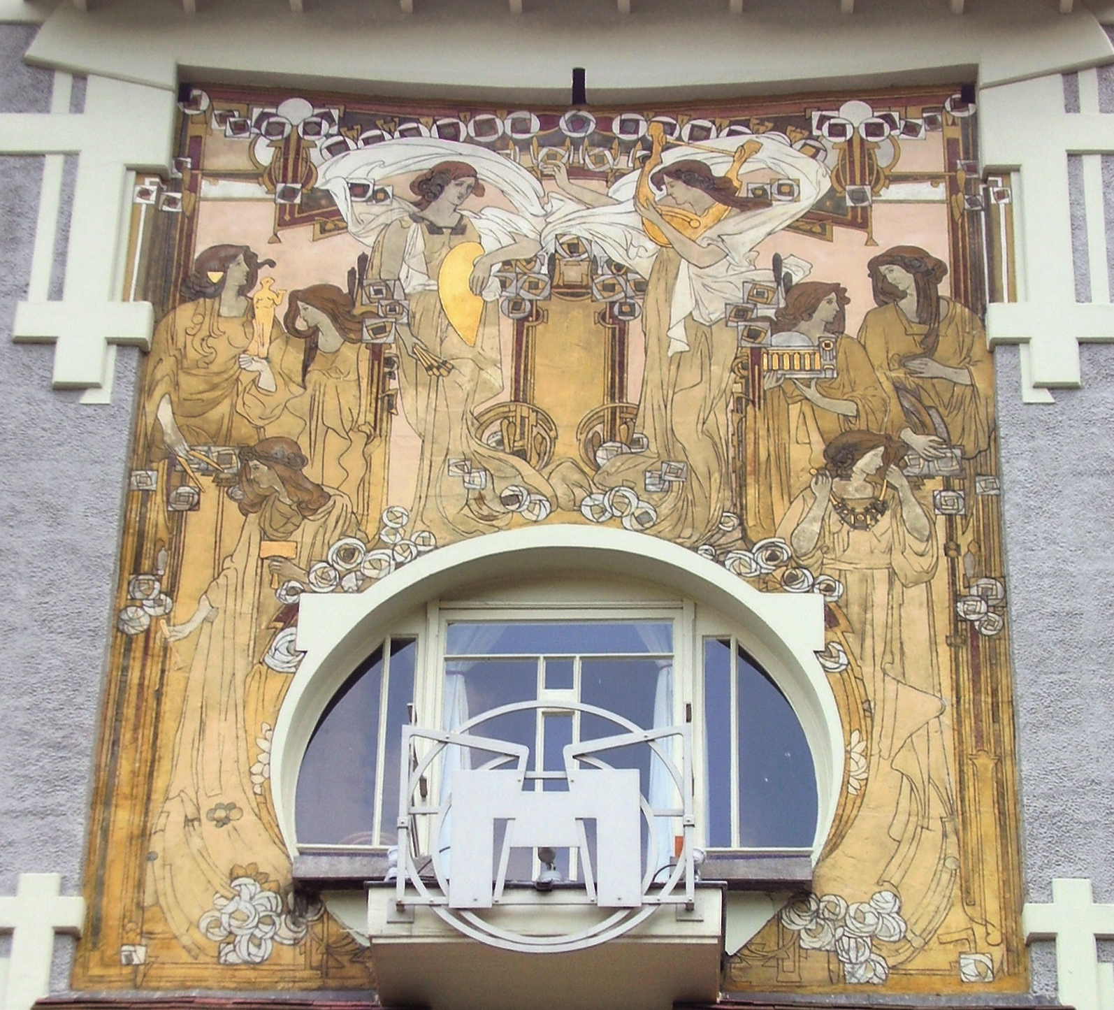 Maison Cauchie, architecte Paul Cauchie, 1905 - Etterbeek (Bruxelles) Détail sgraffite 2e étage